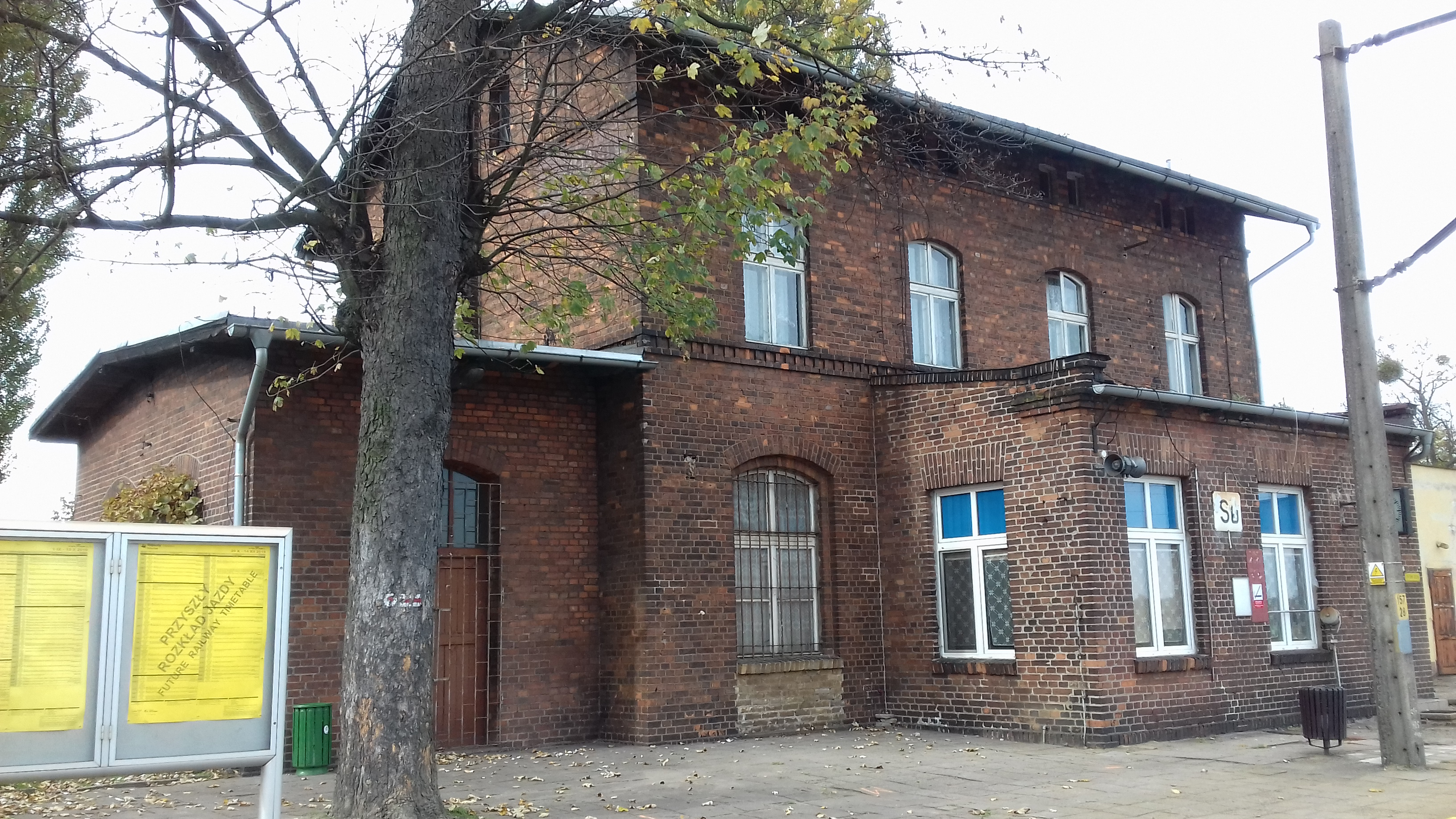 Oznakowanie końca turystycznego szlaku pieszego nr 186 na stacji kolejowej w Sulęcinku.